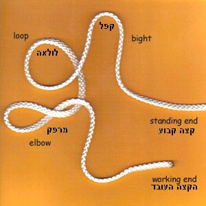 מושגי יסוד בקשירת חבל. התמונה מוויקי באנגלית, עם תוספת כיתוב עברי.